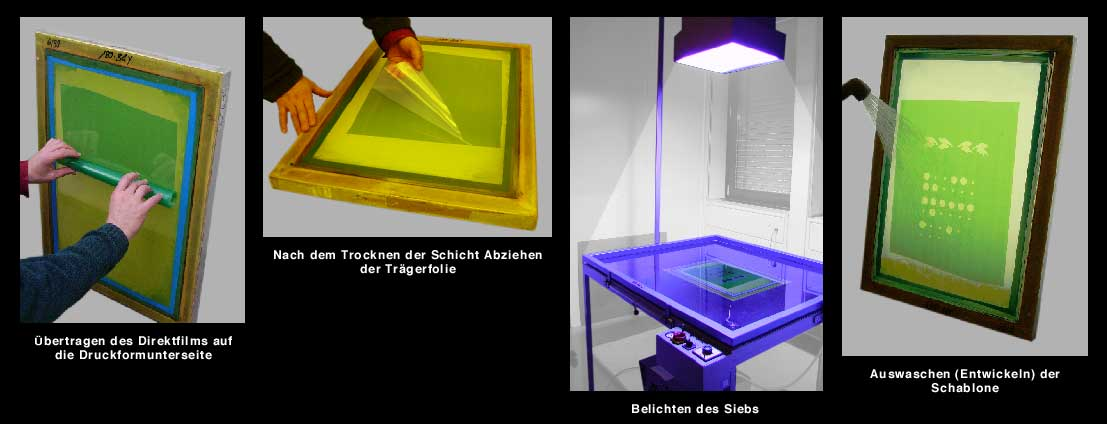 Siebdruckschablone mit Direktfilm